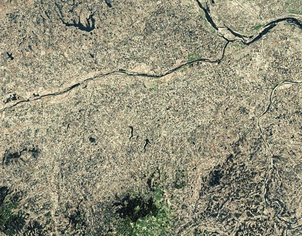 汉中市南镇县卫星图